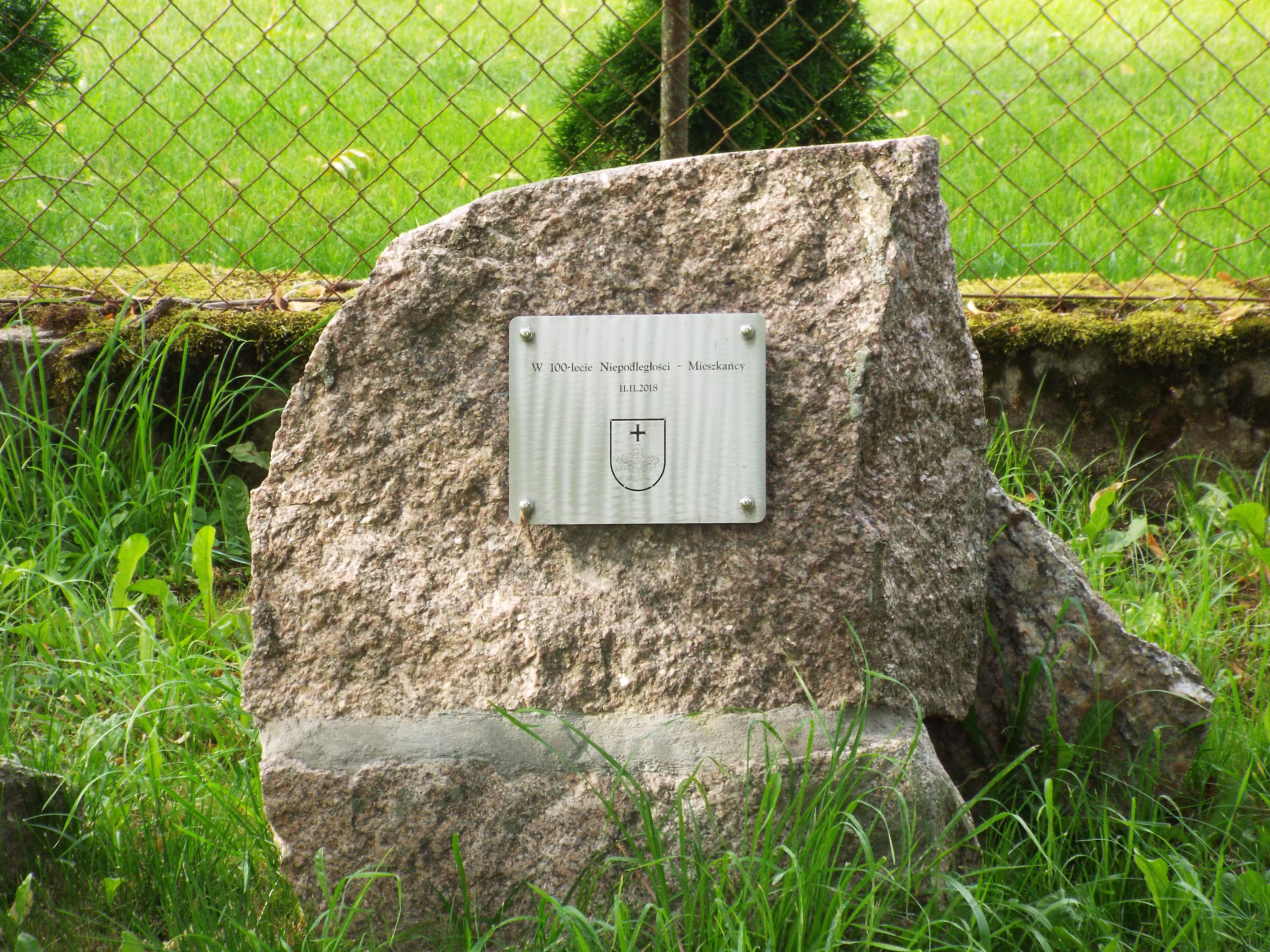 Brzezina - głaz pamiątkowy "Stulecie odzyskania Niepodległości"